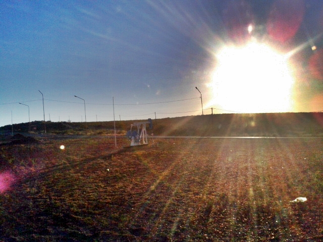 Monumento al Petróleo en el ingreso a 25 de Mayo, La Pampa.